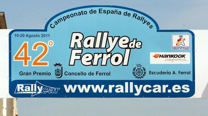 Placa del Rally de Ferrol de 2011, Campeonato de Españad e Rallyes